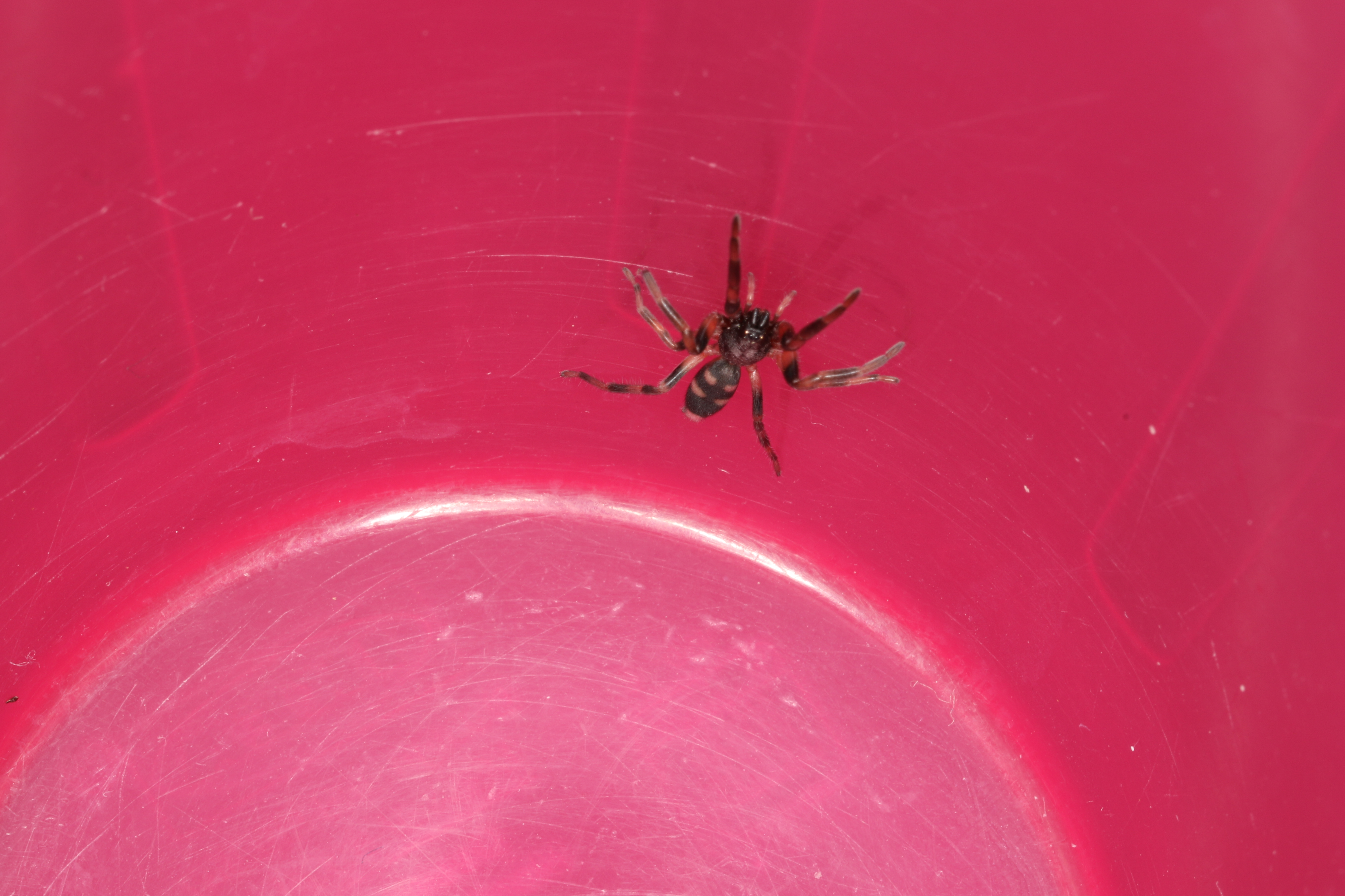 Lampona murina (Platnick), Aranda, ACT, 31 December 2015